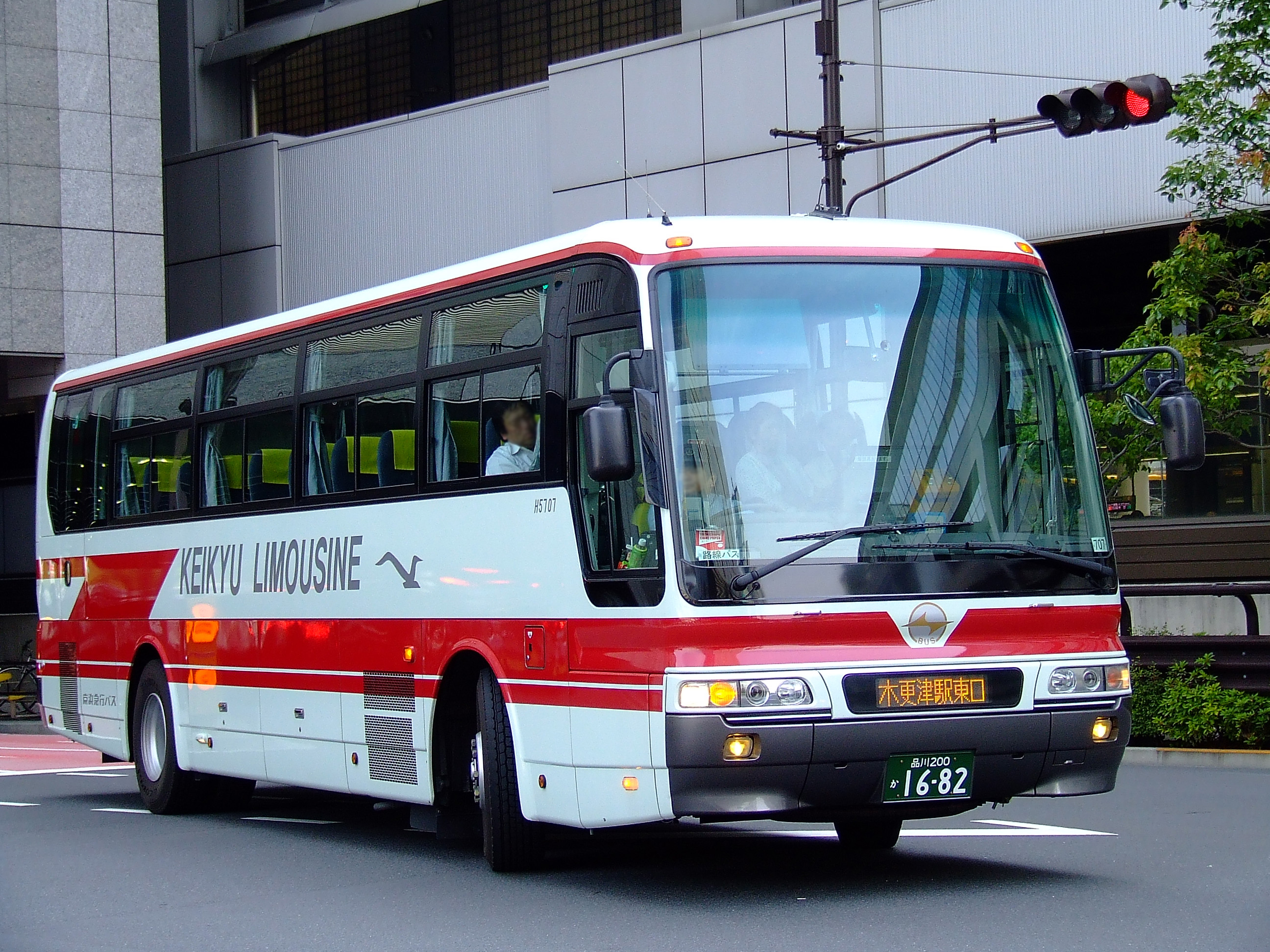 京浜急行バスの高速バス 品川～木更津線 品川駅東口付近にて